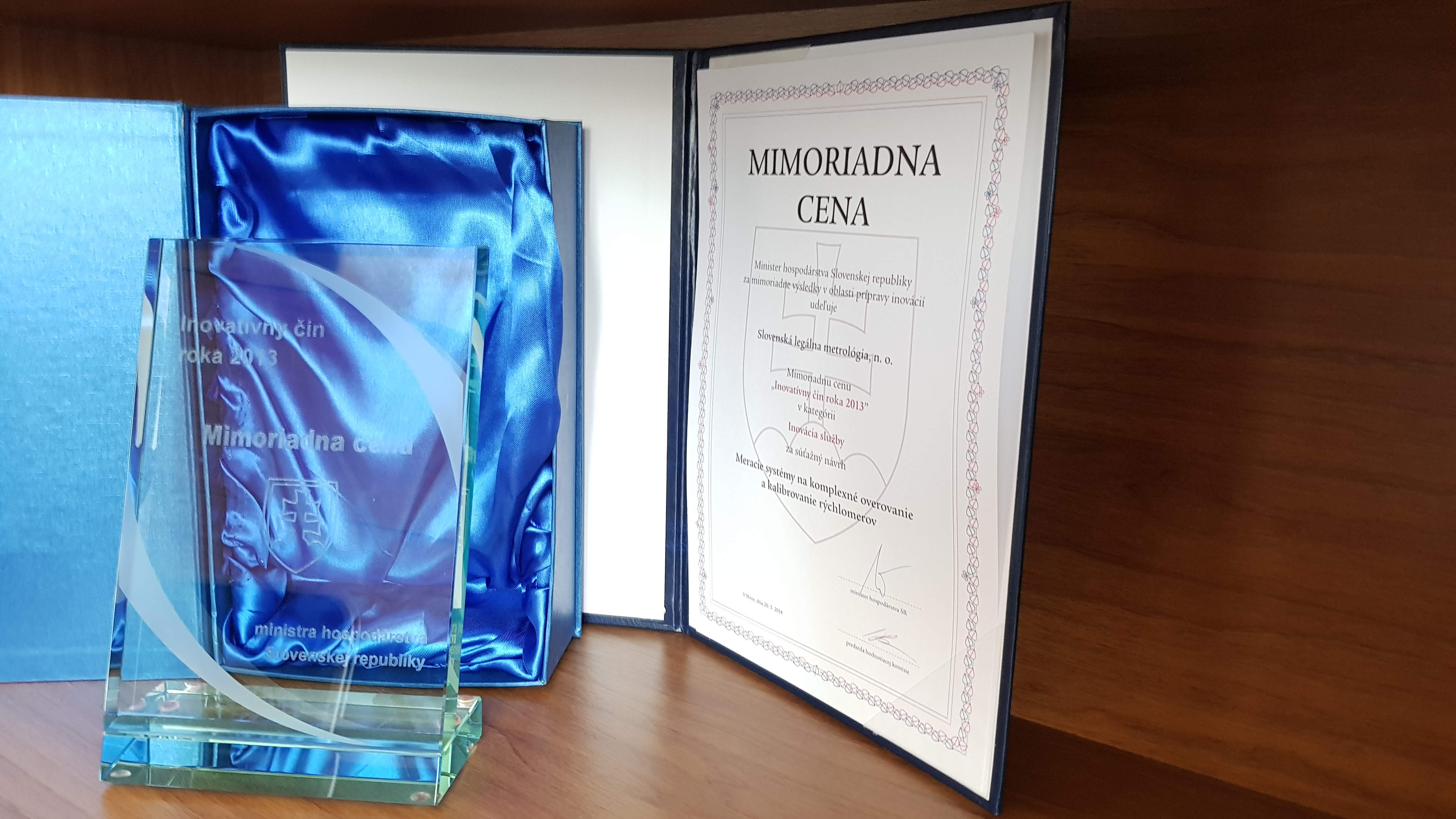 Mimoriadna cena pre Slovenskú legálnu metrológiu za inovatívny čin roka 2013